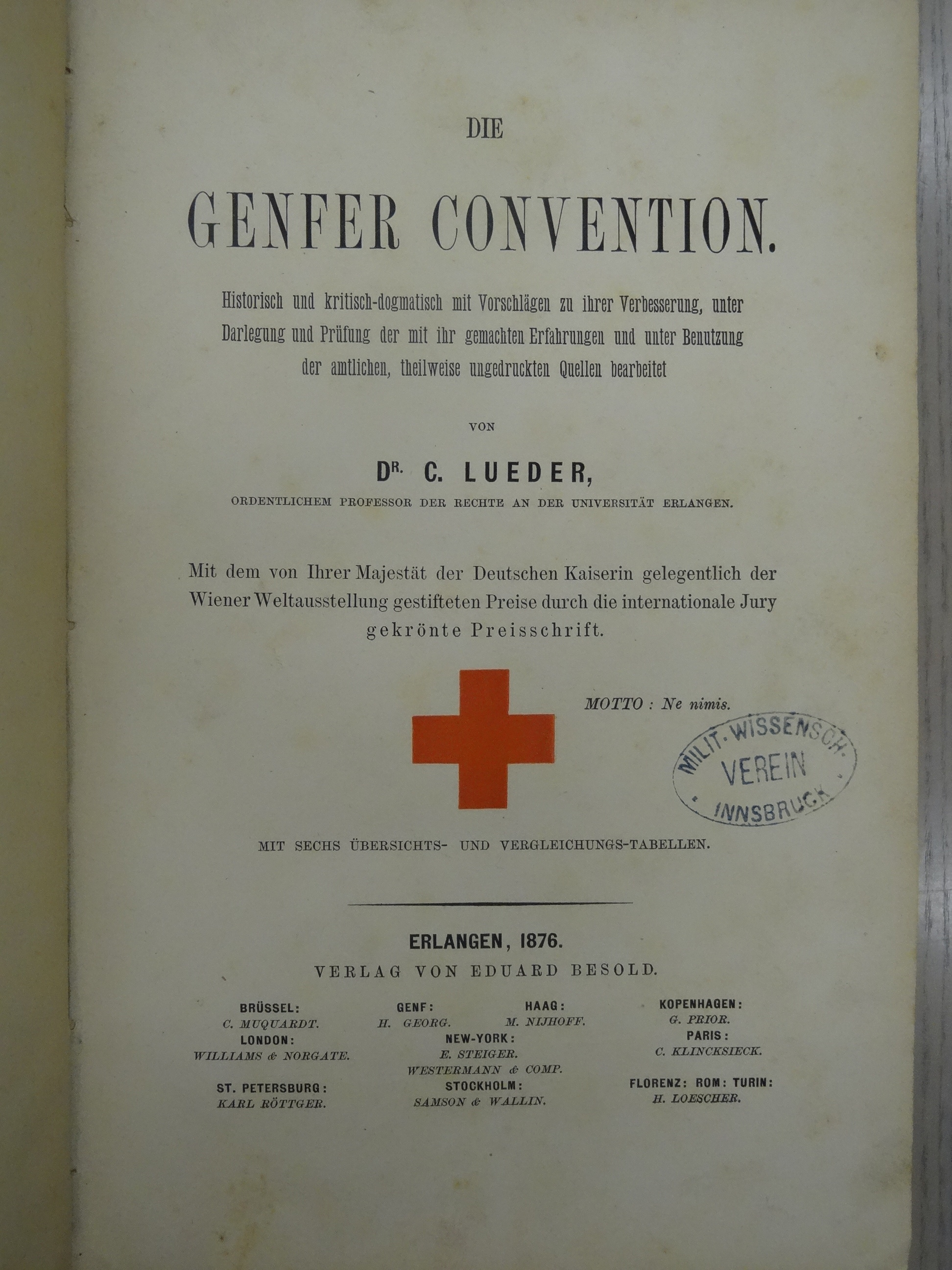 Konvention teilweise ; 444 S. ; Gr. in-8° ; 26cm